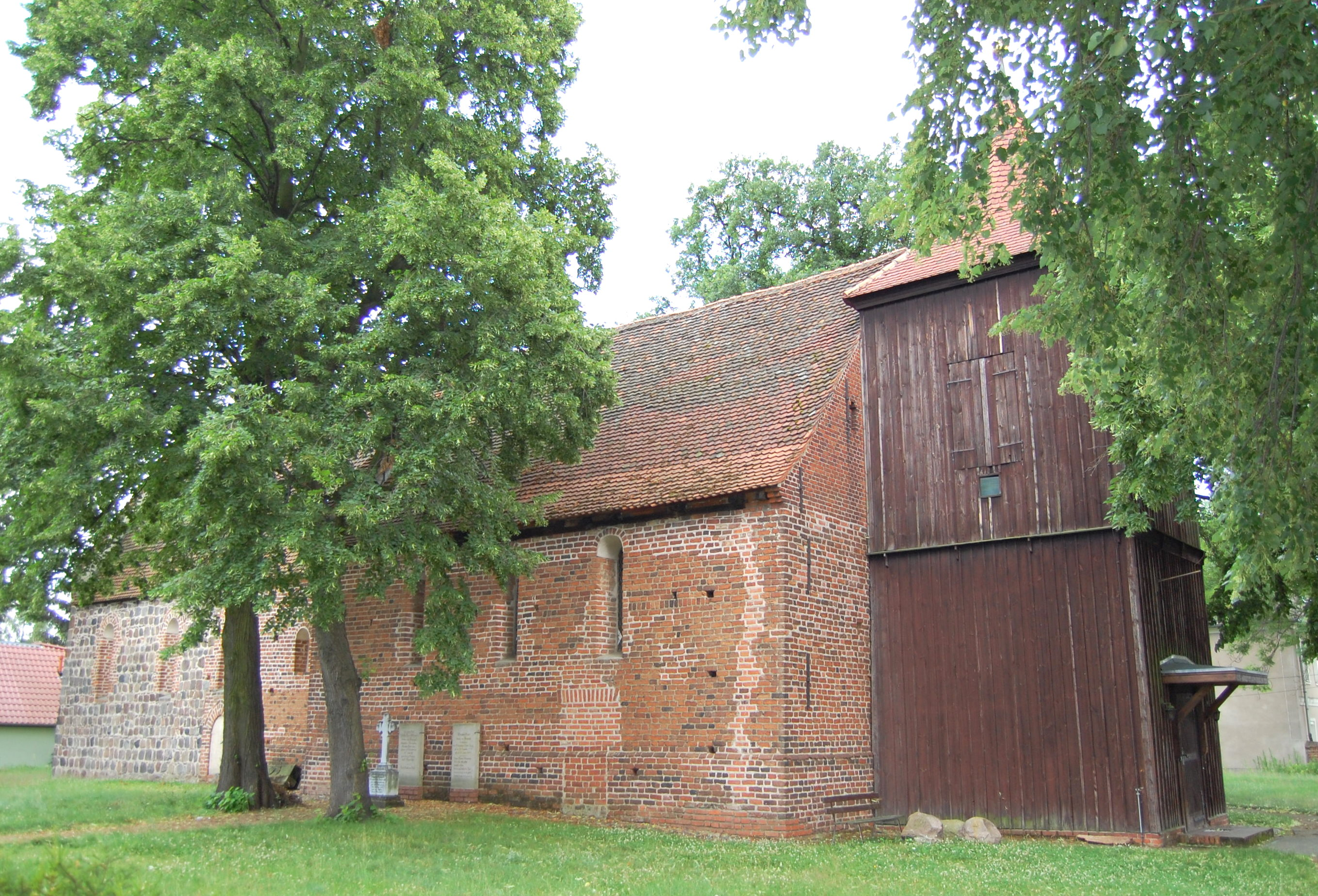 Deutsch Dorfkirche Steinkirchen, Nordseite